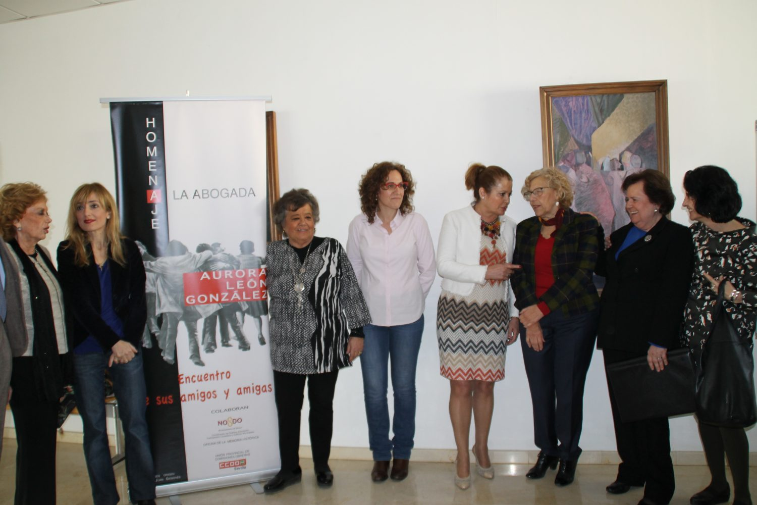 Manuela Carmena, alcaldesa de Madrid, ha participado hoy en la Facultad de Derecho de Sevilla en el homenaje a Aurora León, la primera abogada laboralista de Andalucía. Al acto, organizado por el Centro de Estudios Andaluces, la Fundación de Estudios Sindicales y Cooperación y el Instituto Europeo de Relaciones Industriales, han asistido entre otros la abogada Cristina Almeida, el presidente del Instituto Europeo de Relaciones Industriales, Antonio Ojeda, y catedráticos de Derecho del Trabajo.